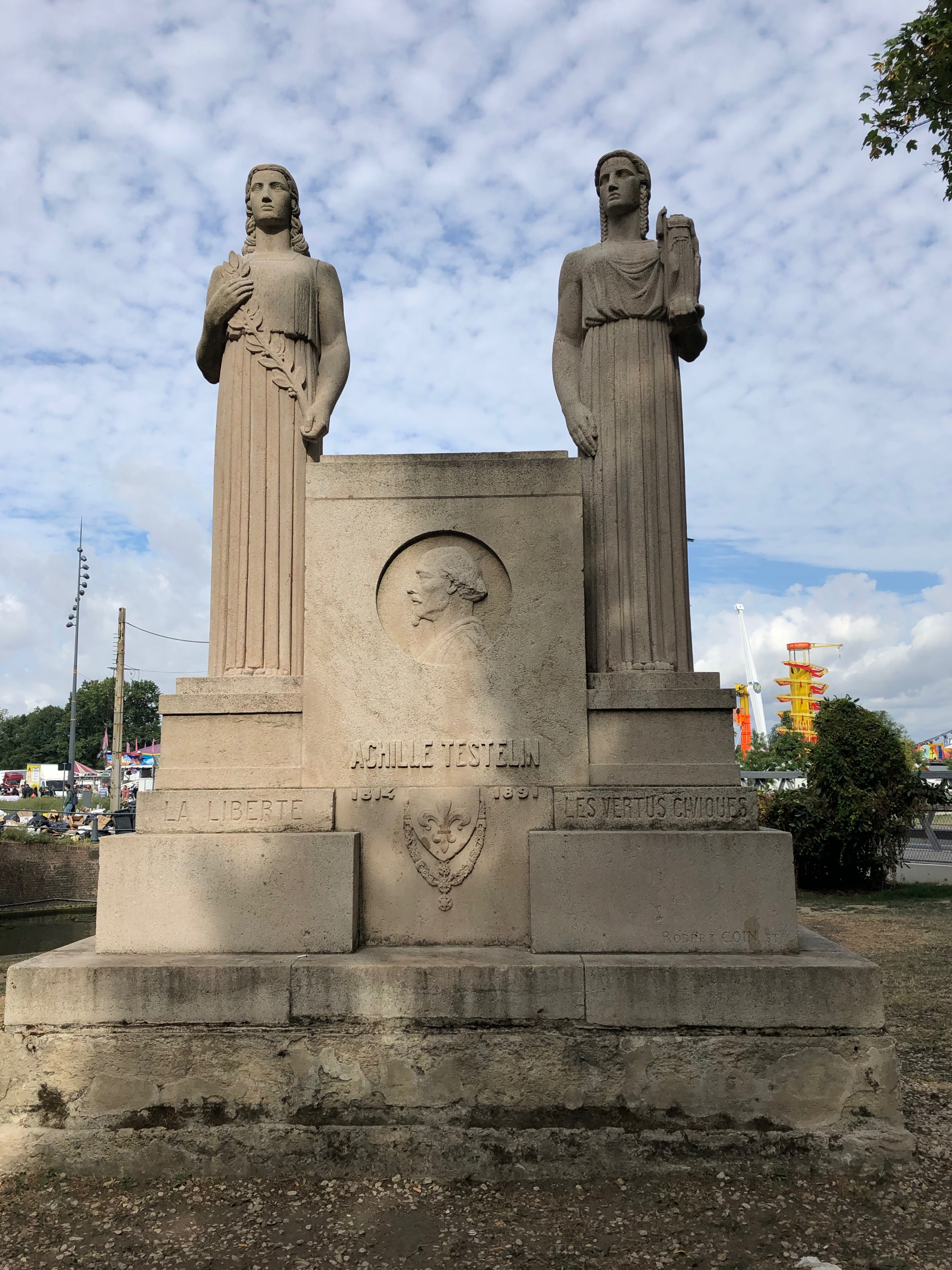 Monument situé à Lille, en bordure du canal de l'Esplanade, près du pont Ramponneau. Édifié, le 13 octobre 1933, en l'honneur d'Achille Testelin (1814-1891), en remplacement d'un monument précédemment détruit par les Allemands en 1917. Sculpteur : Robert Coin ; architecte : Émile Debuisson.